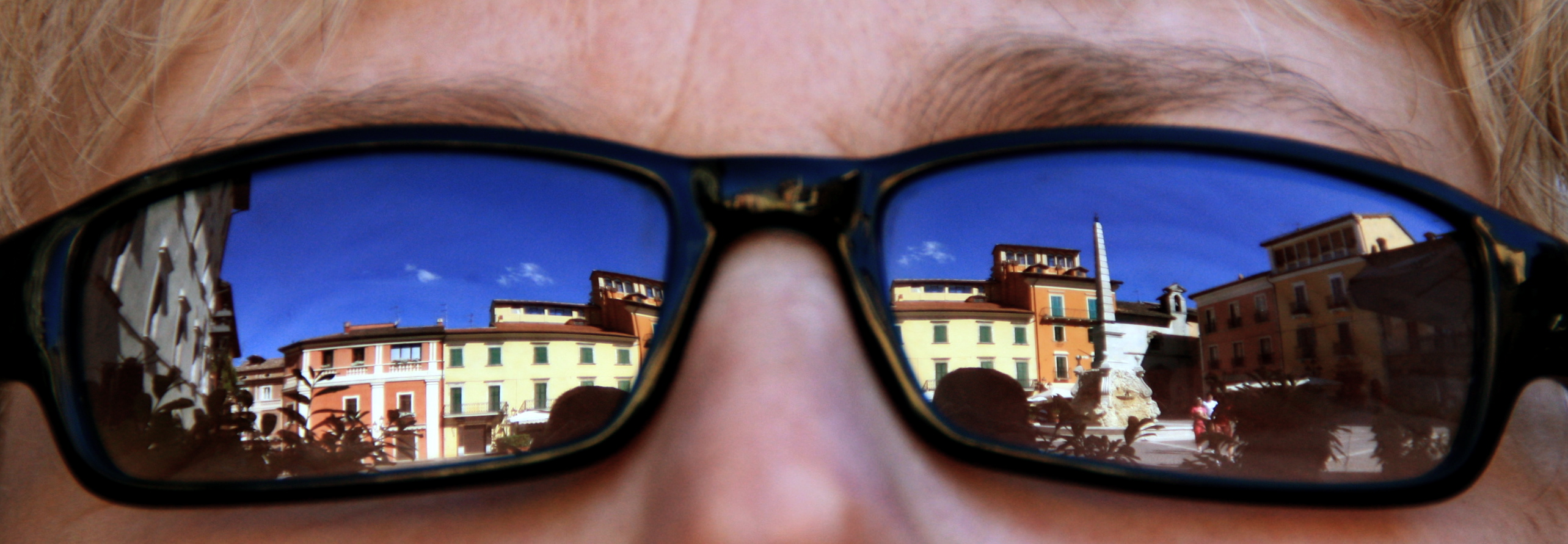 Riflessioni della Piazza dell'Obelisco (Tagliacozzo) su occhiali da sole - Italia